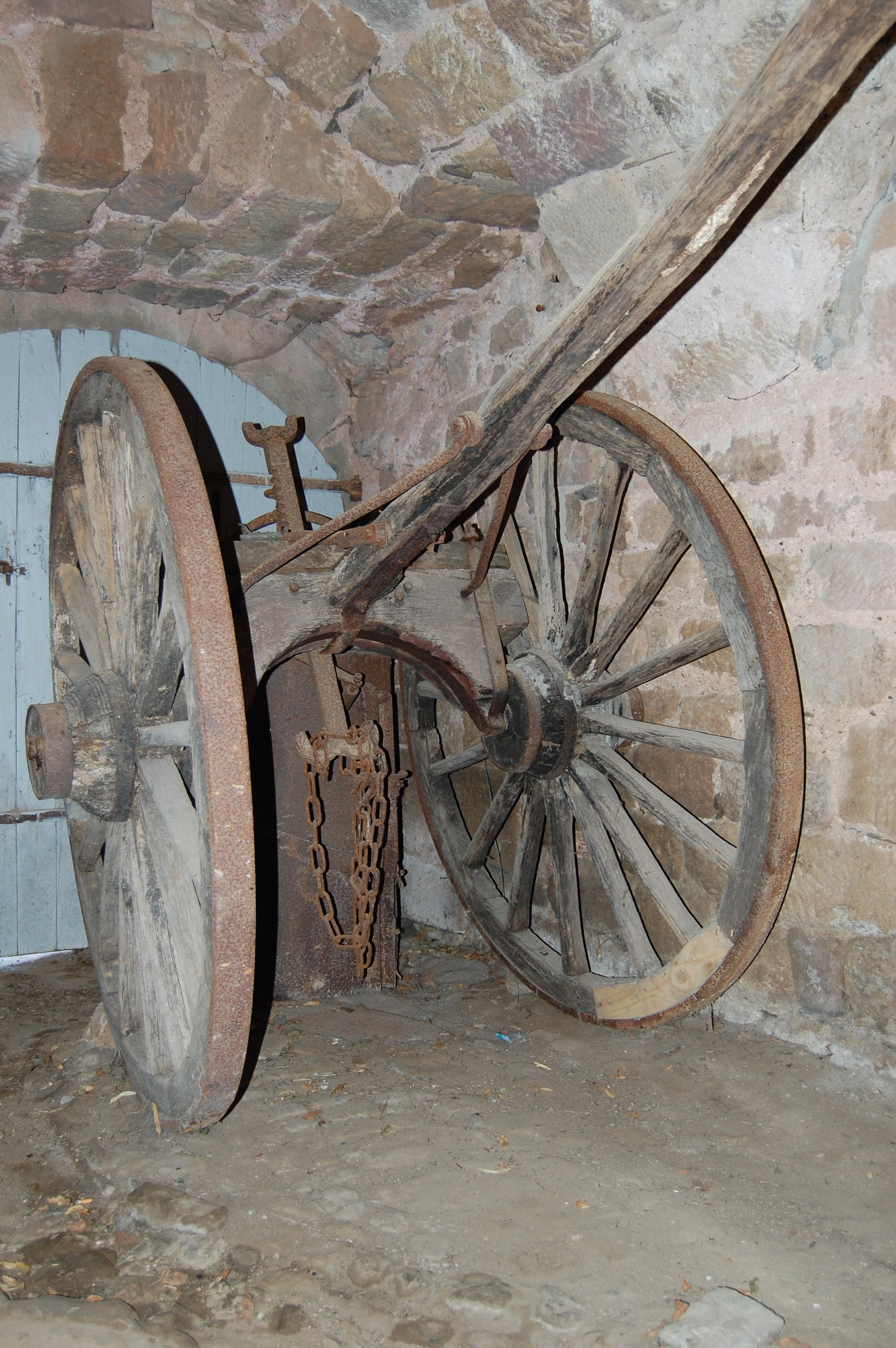 Trinqueballe